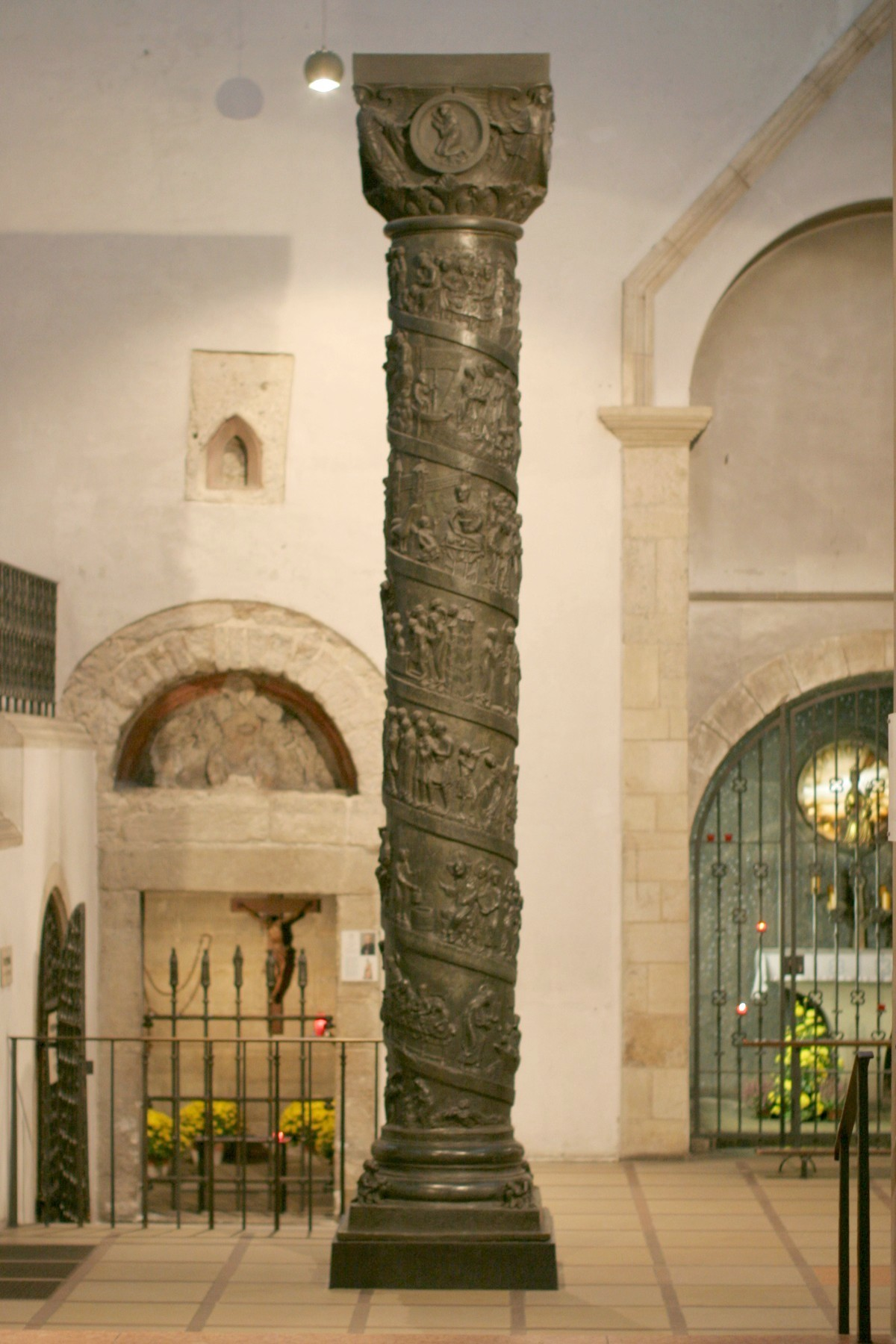 Christussäule im Hildesheimer Dom